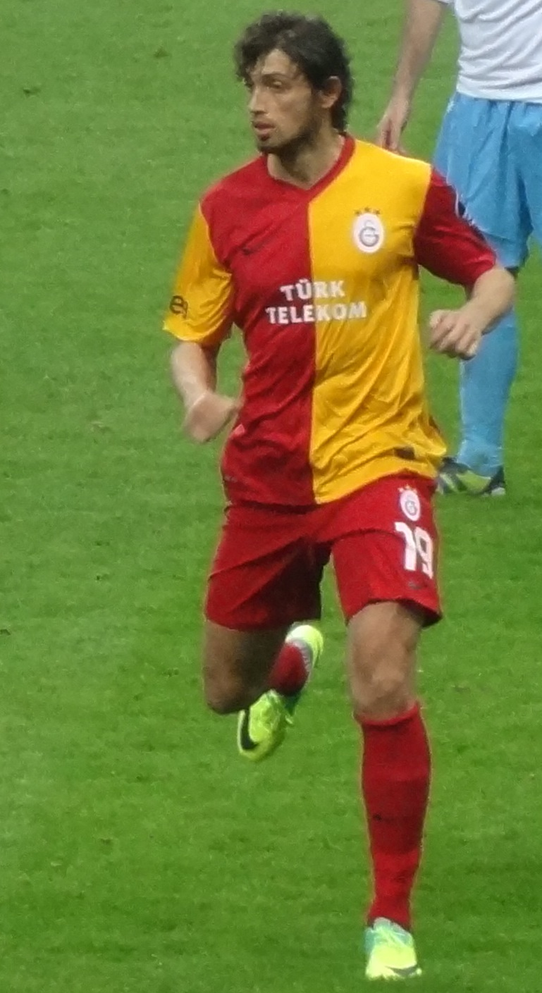 Mehmet Batdal Trsbzonspor karşısında